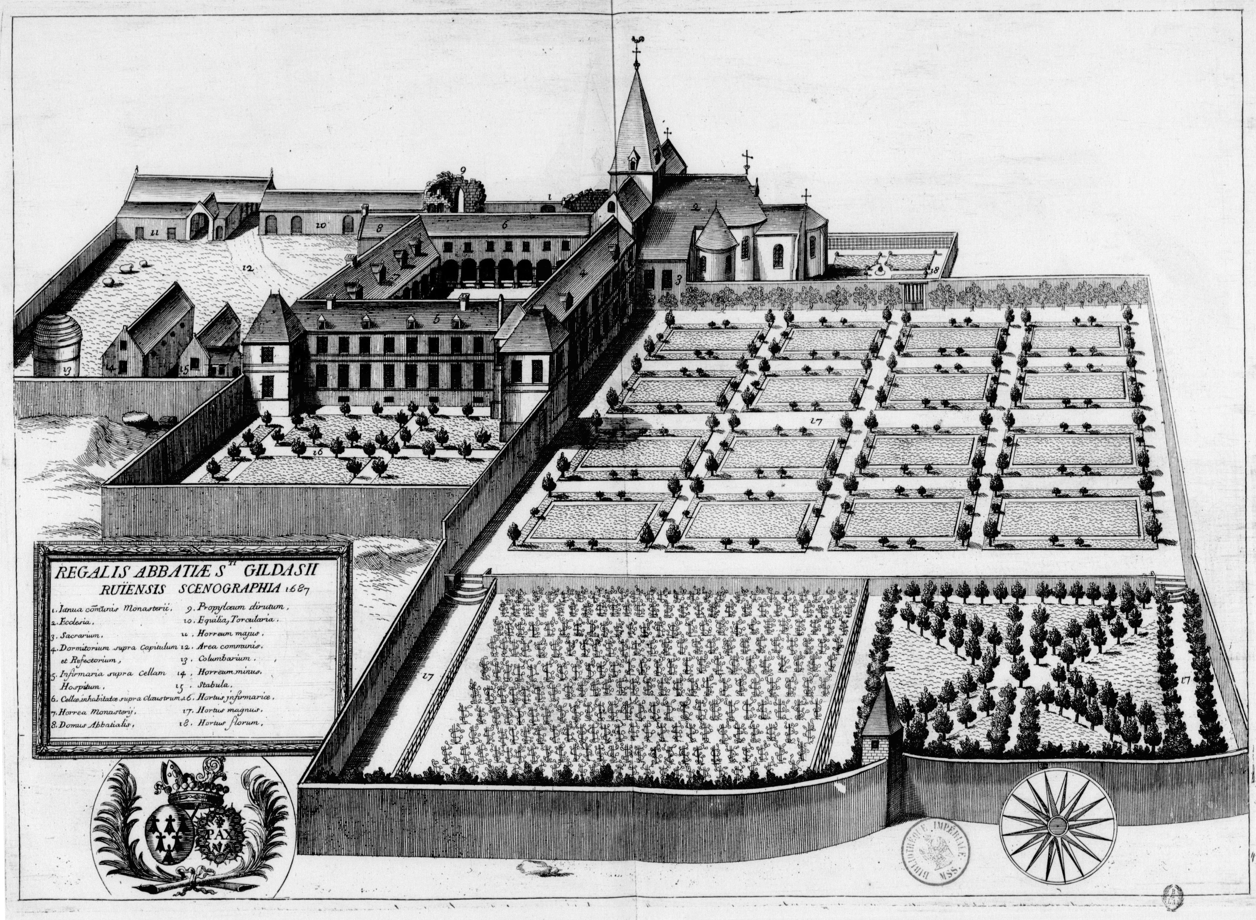 Planche gravée du 17ème siècle représentant l'abbaye Saint-Gildas de Rhuys, dans le livre Monasticon Gallicanum.